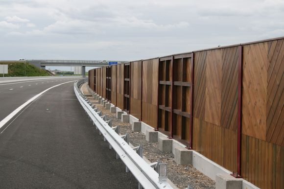 Autoroute A19 – Ecran anti-bruit en façade du bourg de la gare d'Auxy - cliché du 27 mai 2009